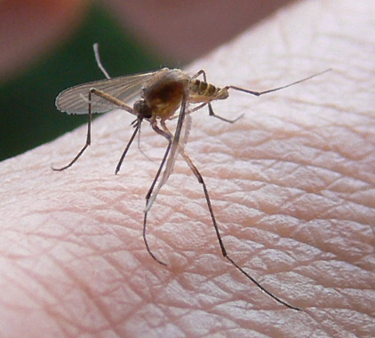 Culicidae (Mosquito)